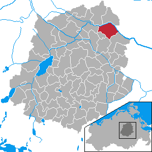 Bentzin, Landkreis Demmin, Mecklenburg-Vorpommern